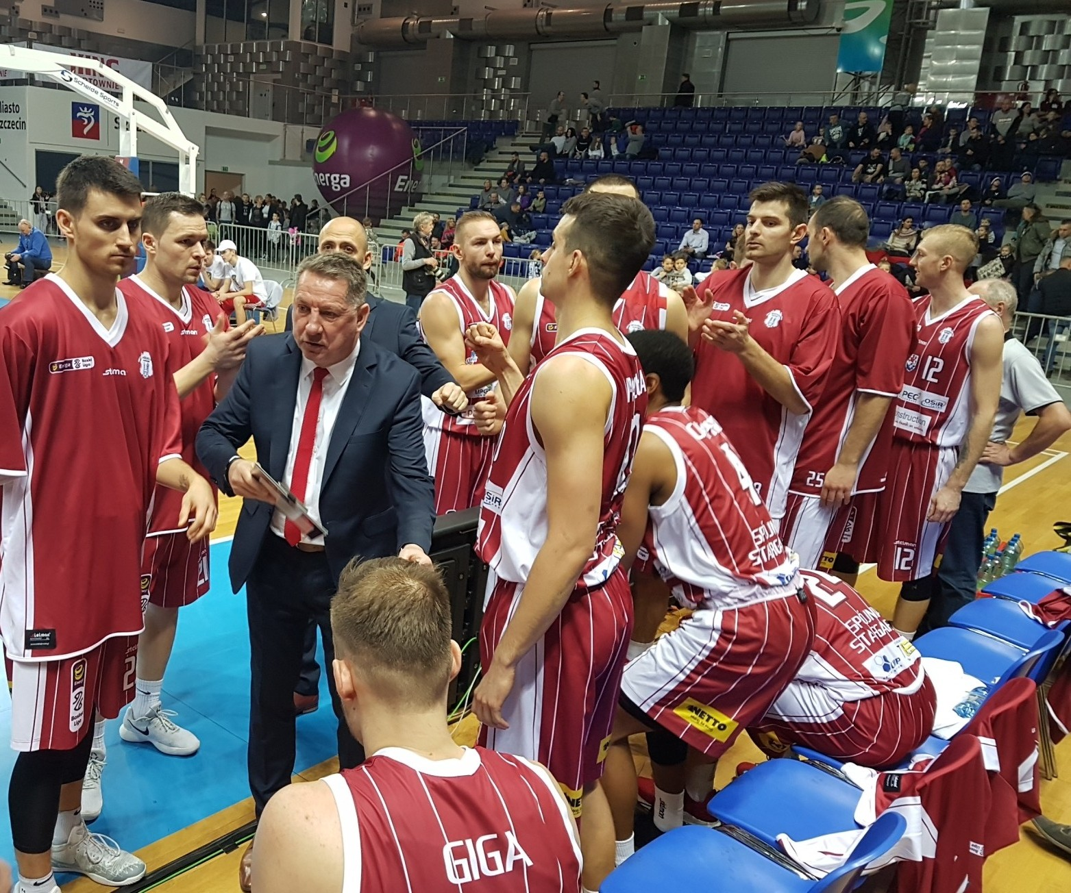 Spójnia Stargard podczas derbów w Szczecinie (20.01.2019)